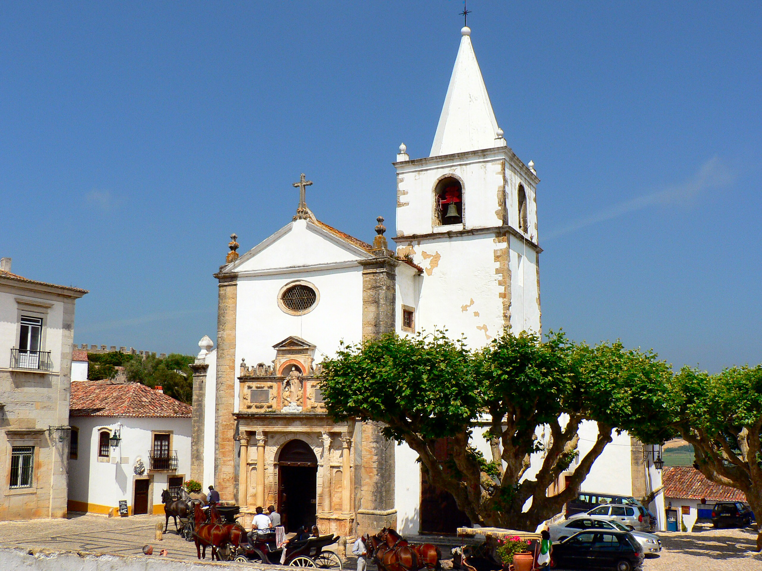 Igreja de Santa Maria em Óbidos